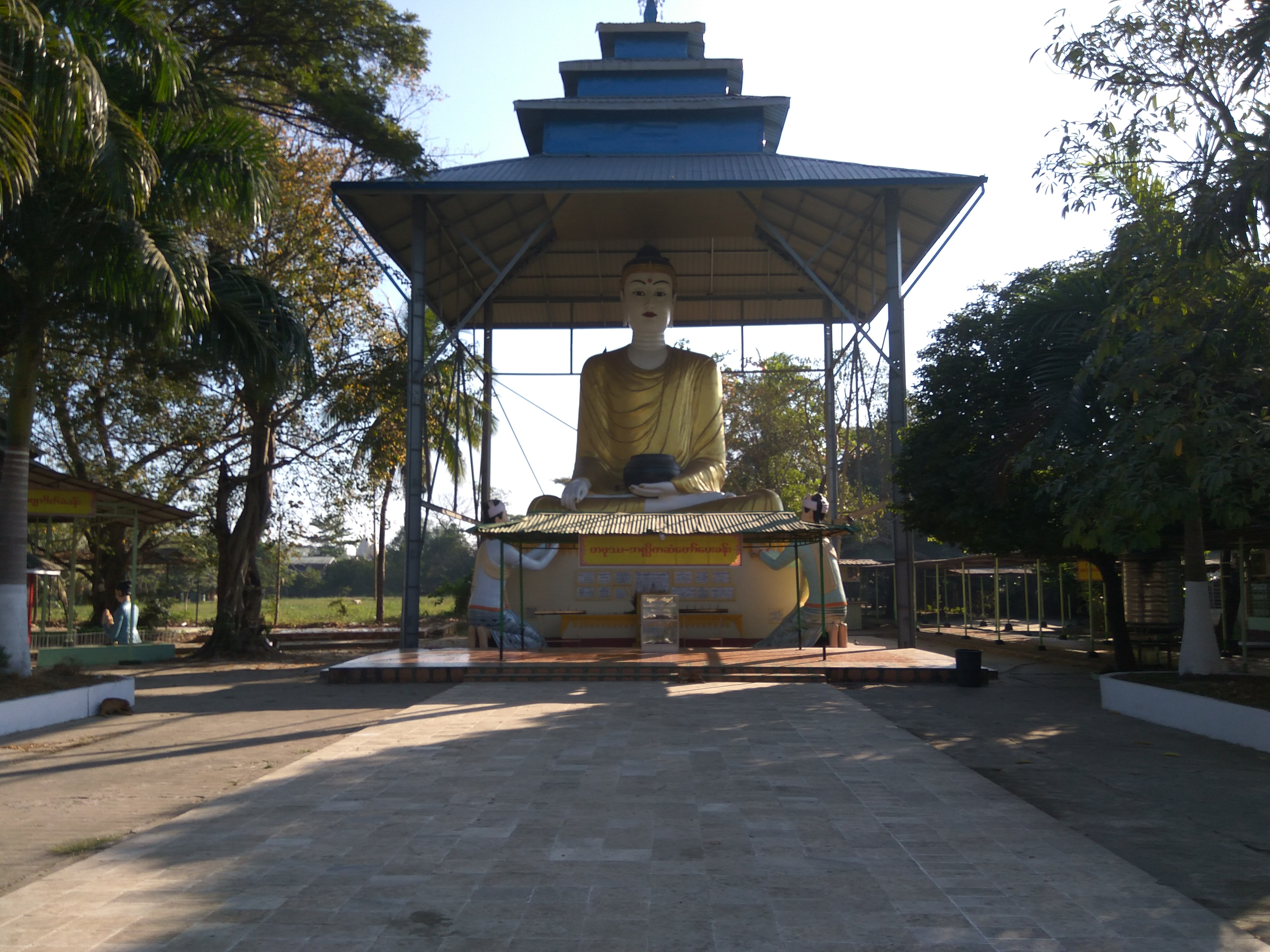 မြန်မာဘာသာ: မြတ်စွာဘုရားသည် တဖုဿနှင့် ဘလ္လိကအား ဆံတော်ပေးနေပုံ။ ရန်ကုန်မြို့၊ မယ်လမုဘုရားတွင် တည်ရှိသည်။